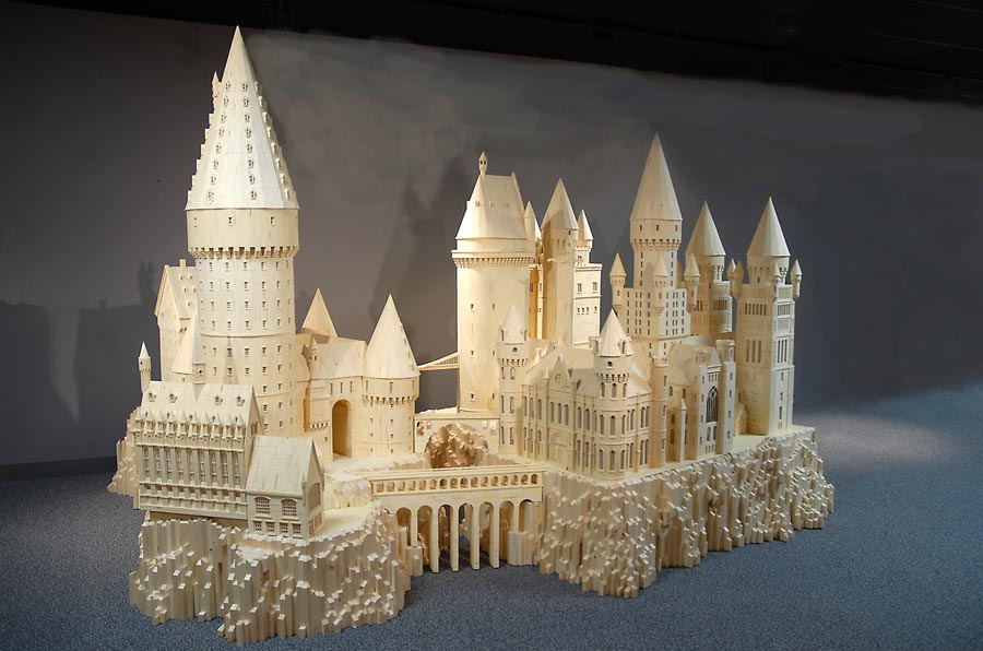 Maqueta de Hogwarts, principal lugar donde se narran los hechos. El Colegio Hogwarts, es el principal escenario donde suceden los hechos de la serie de novelas. Maqueta de la escuela Hogwarts en la serie de adaptaciones cinematográficas de las novelas.